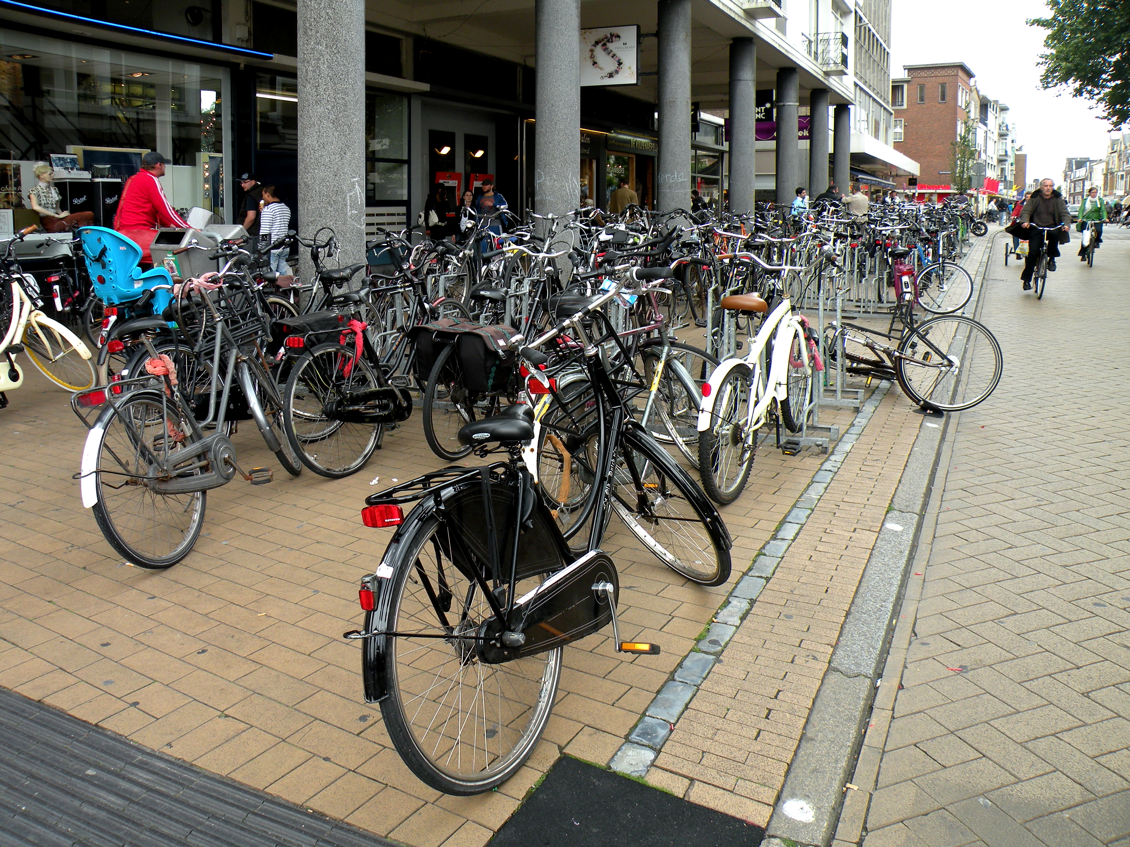 Groningen. Bikes